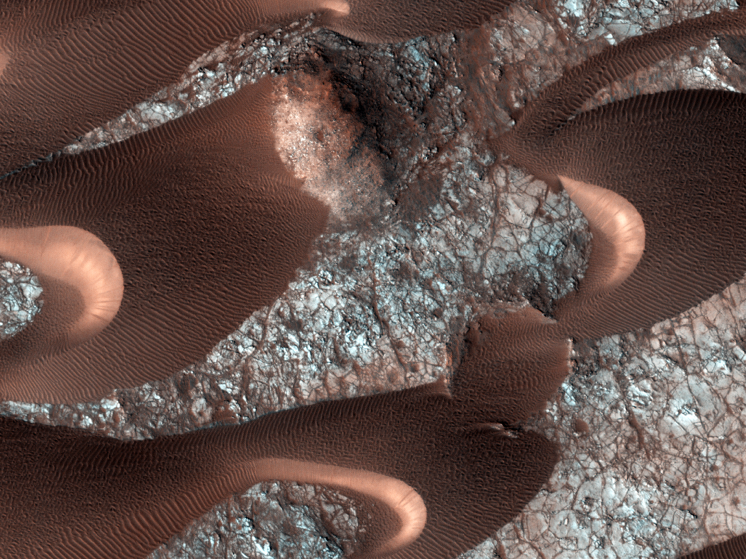 Barchan dunes at Nili Patera